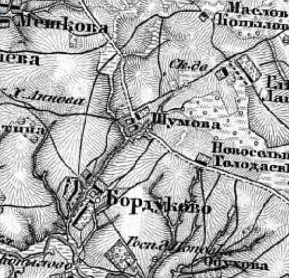 Урочище Шумово в 19 веке